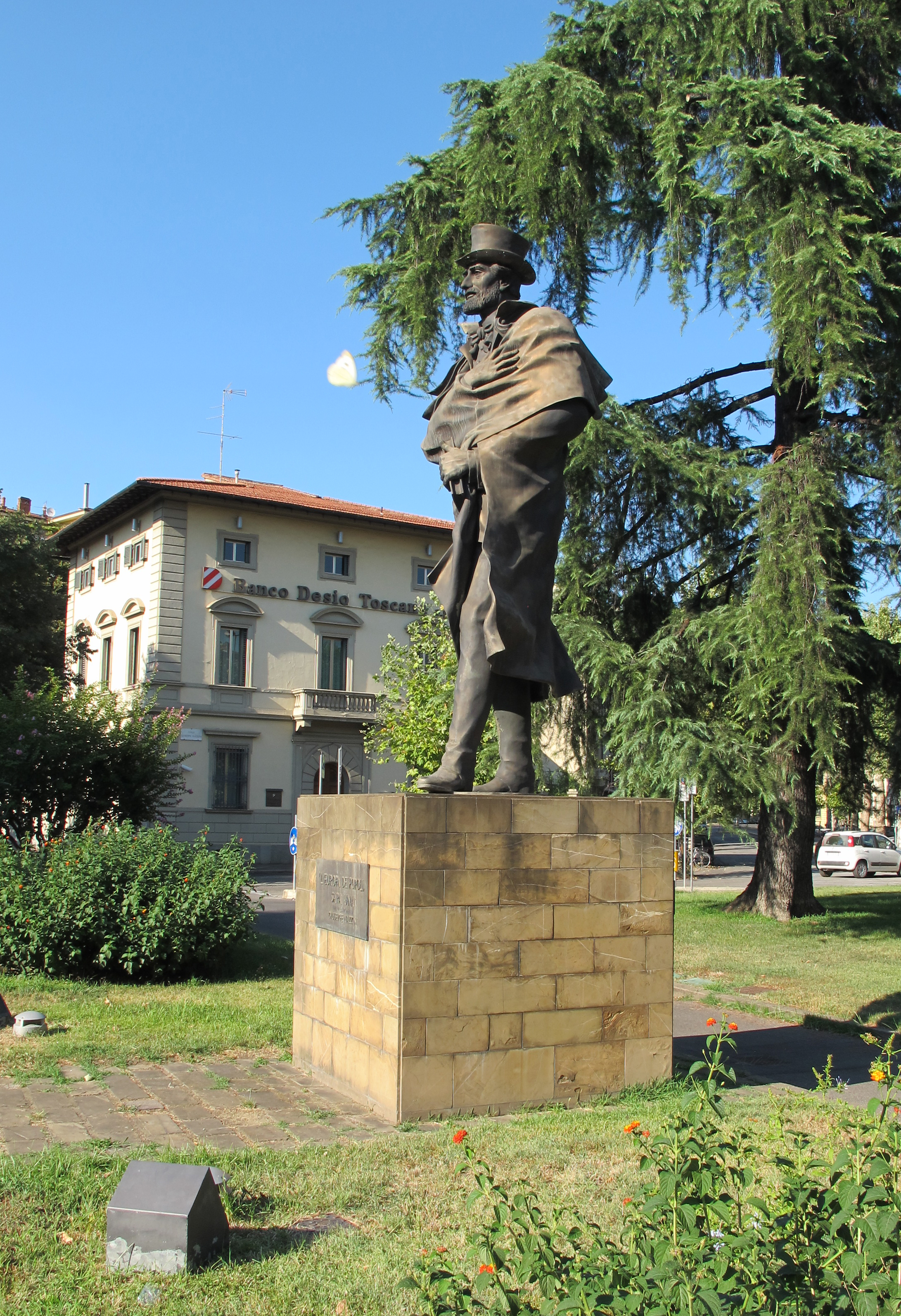 Viale Antonio Gramsci, Firenze